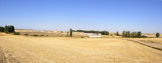 Vista Panoramica de Taroda (Soria - Spain)